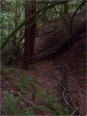 Zeer weinig hellingprocessen in dit bos in California